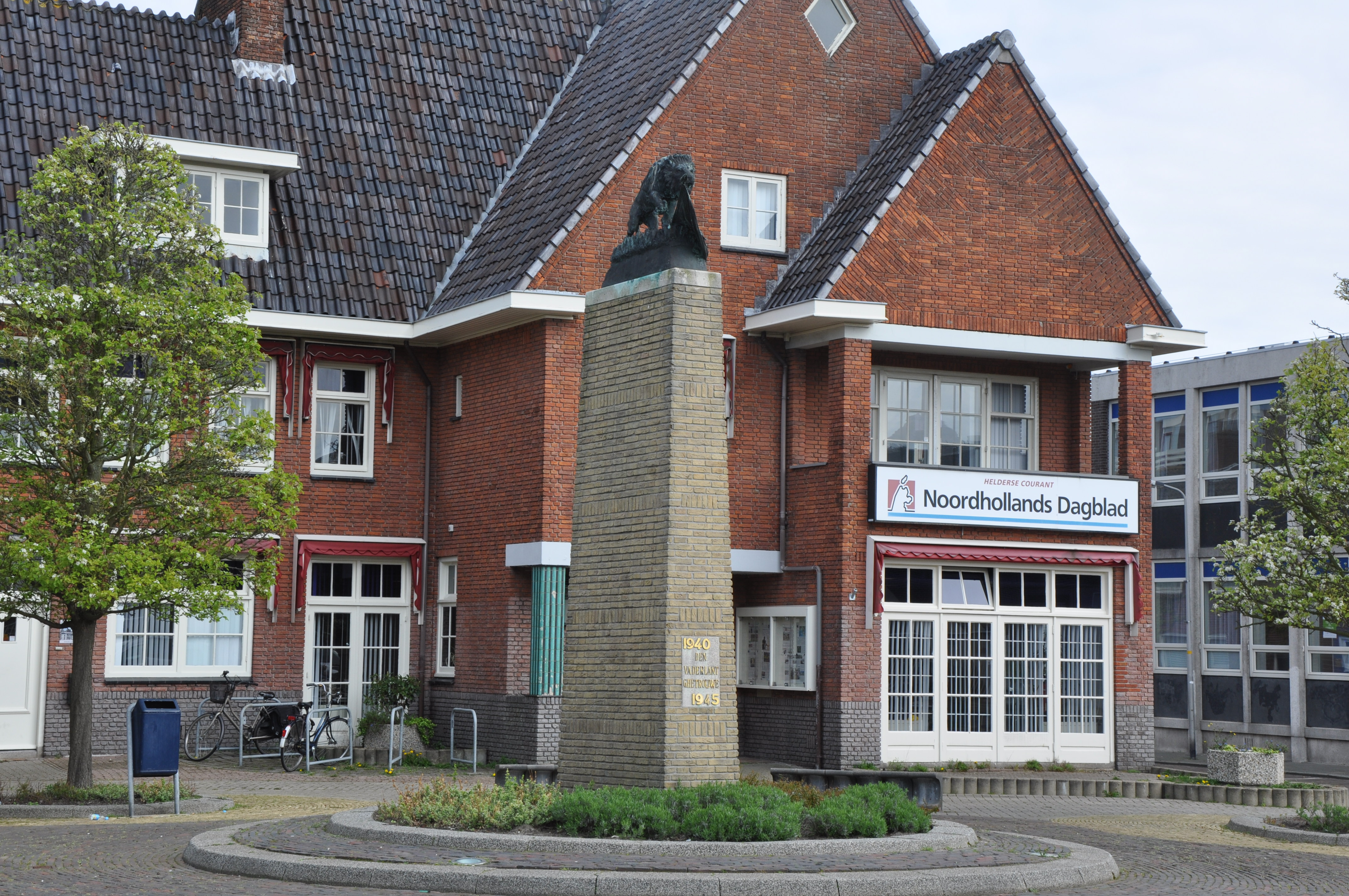 Betreft alle gevallen van de tweede wereldoorlog.